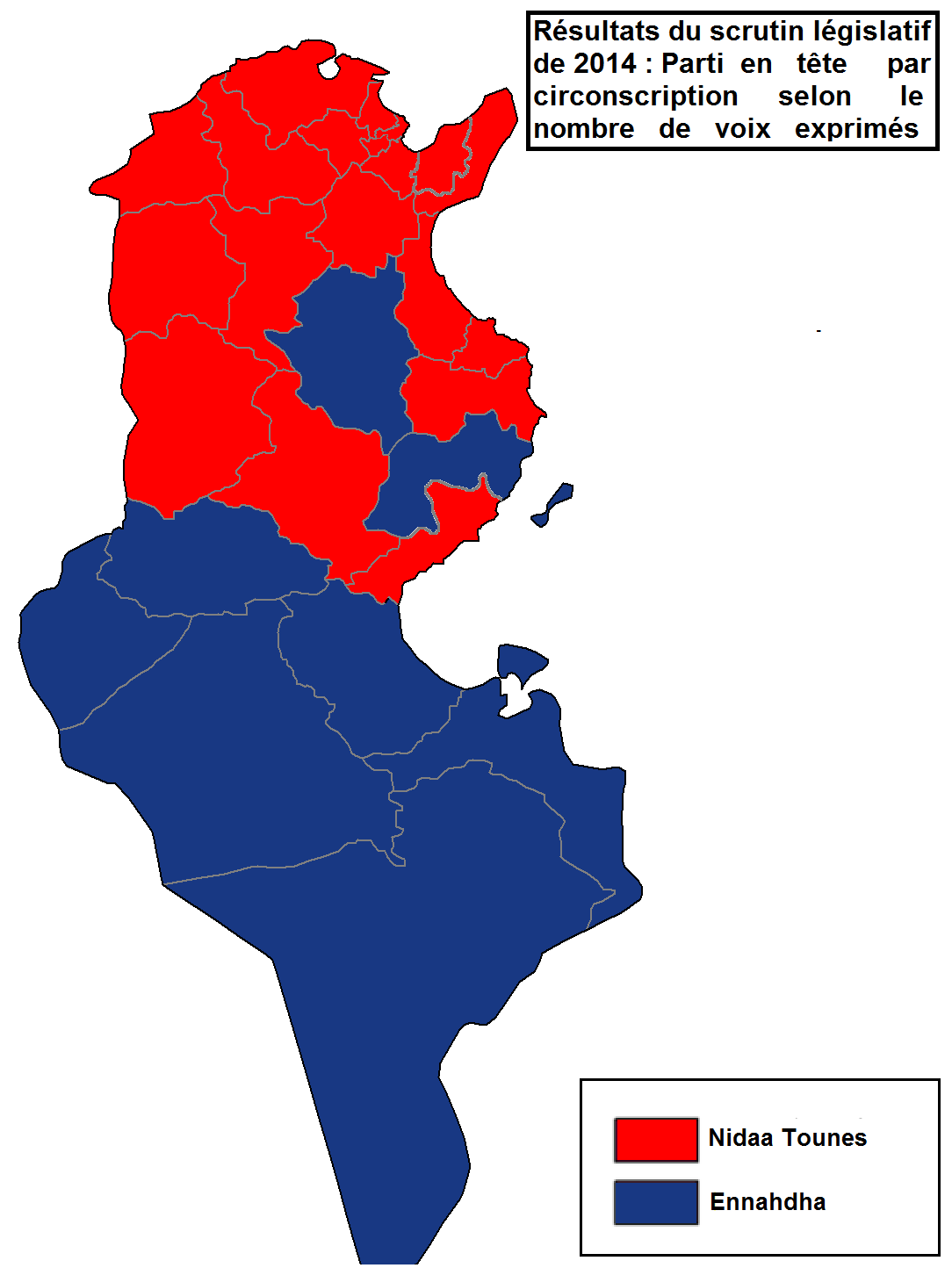 Carte de la Tunisie selon les résultats des élections législatives de 2014 (par le nombre de voix)